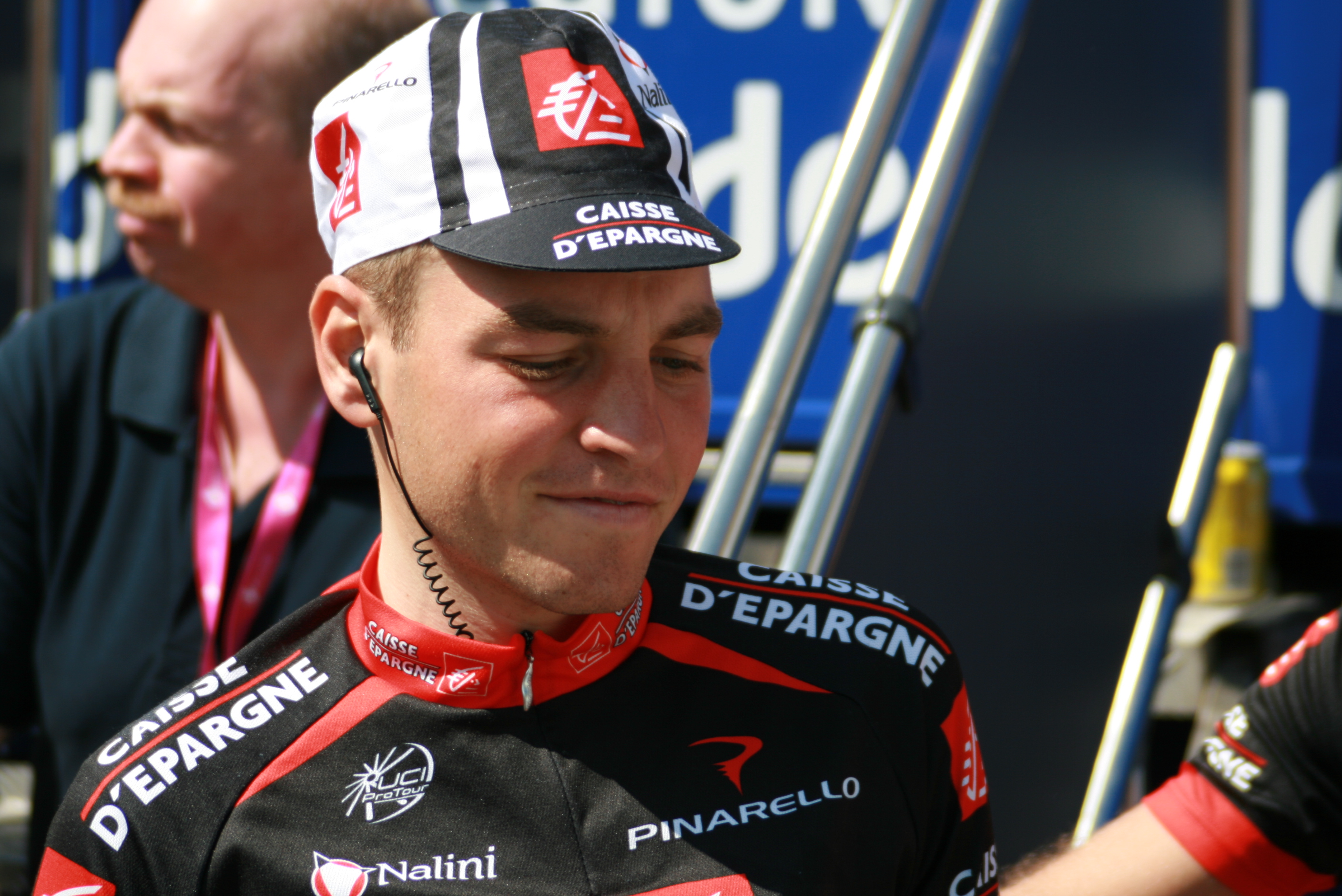 Fabien Patanchon aux Quatre jours de Dunkerque 2008